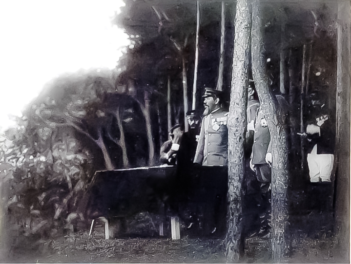 明治天皇 晩年1909年